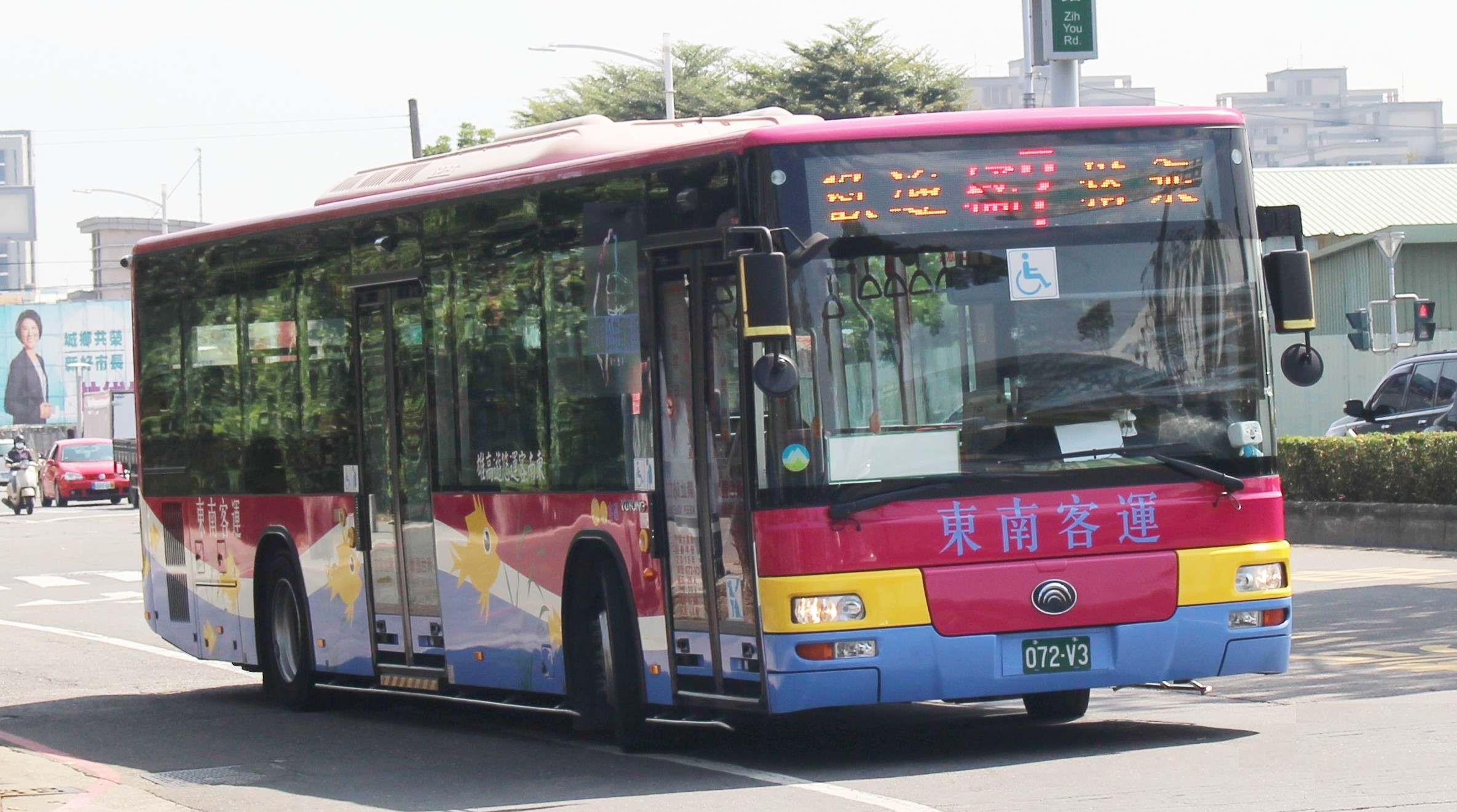 東南客運 2016 YUTONG ZK6128HG 072-V3 橘7